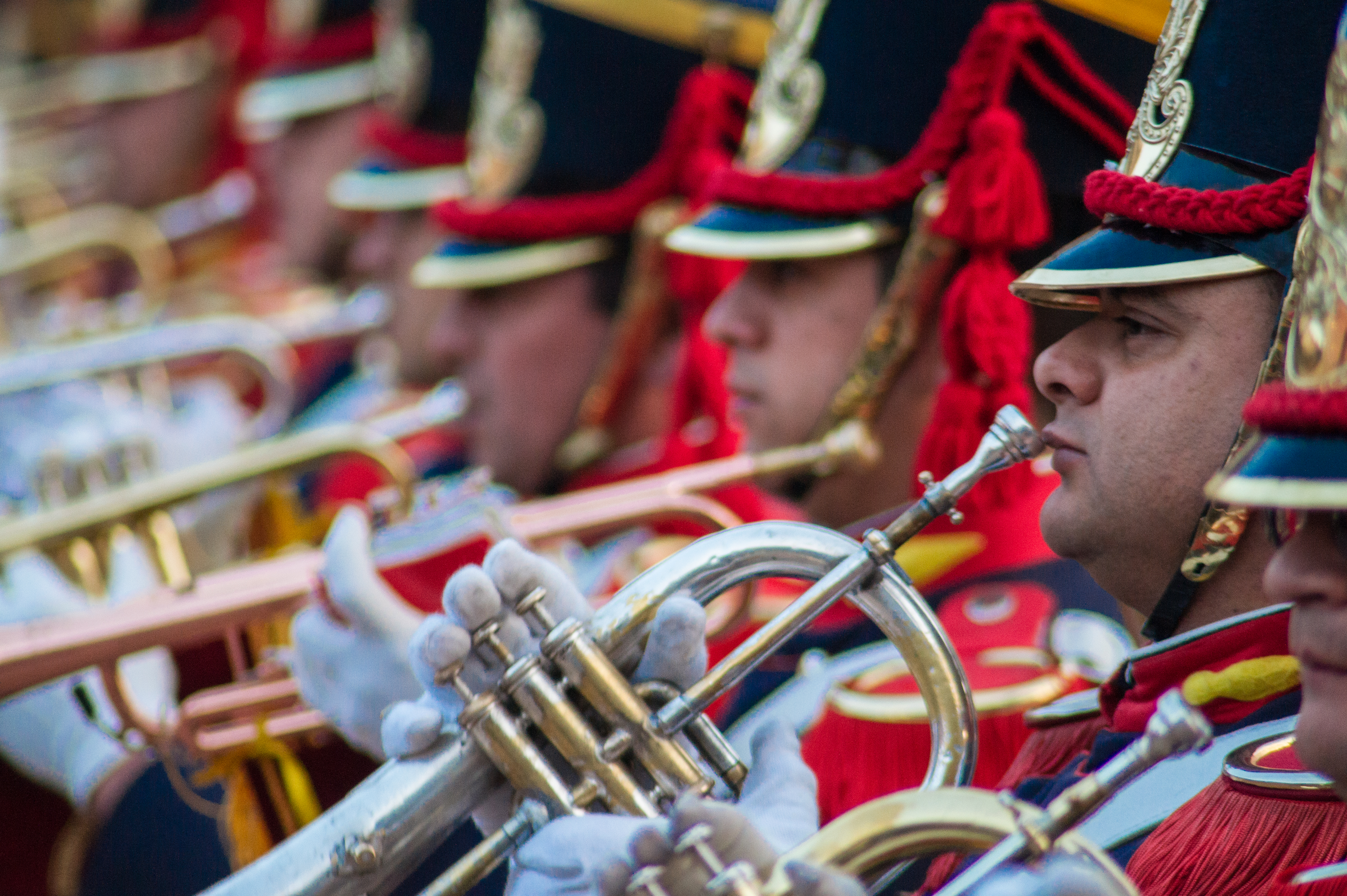 CCambio de Guardia y Arriado de Bandera del Regimiento de Granaderos. Plaza de Mayo.Expresiones culturales:Patrimonio Cultural Inmaterial de la Argentina